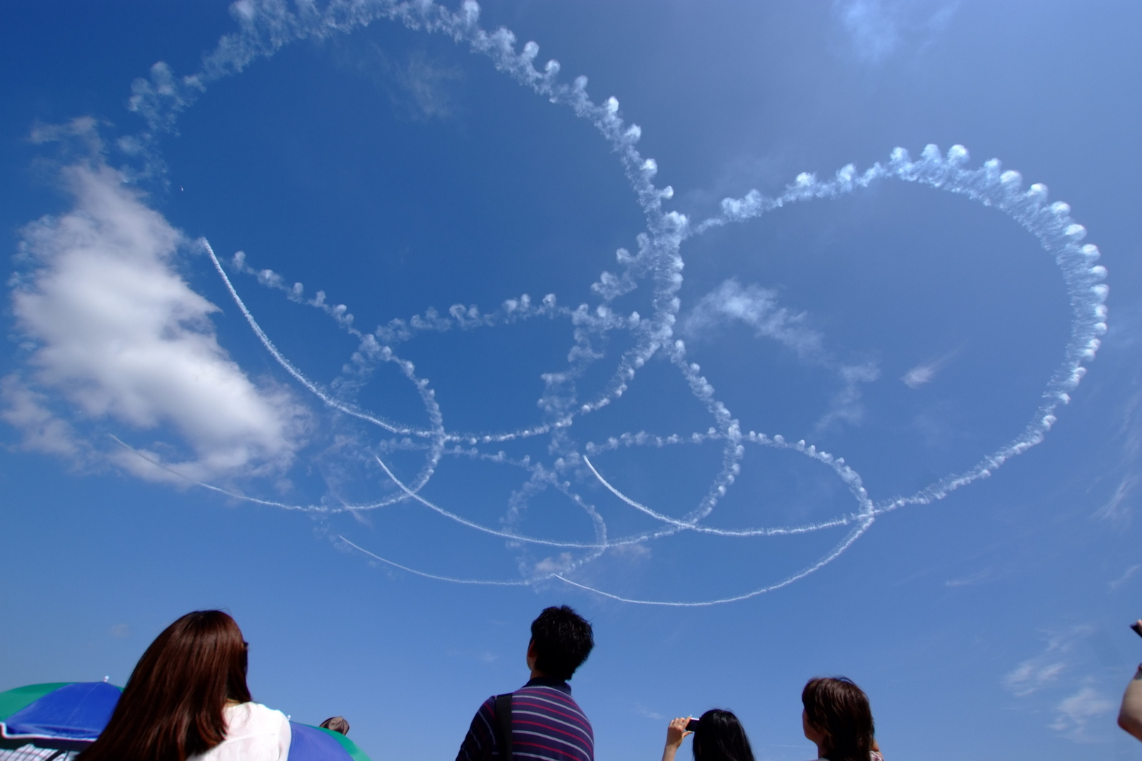 航空自衛隊 千歳基地 航空祭2013。Panoramioより転載。